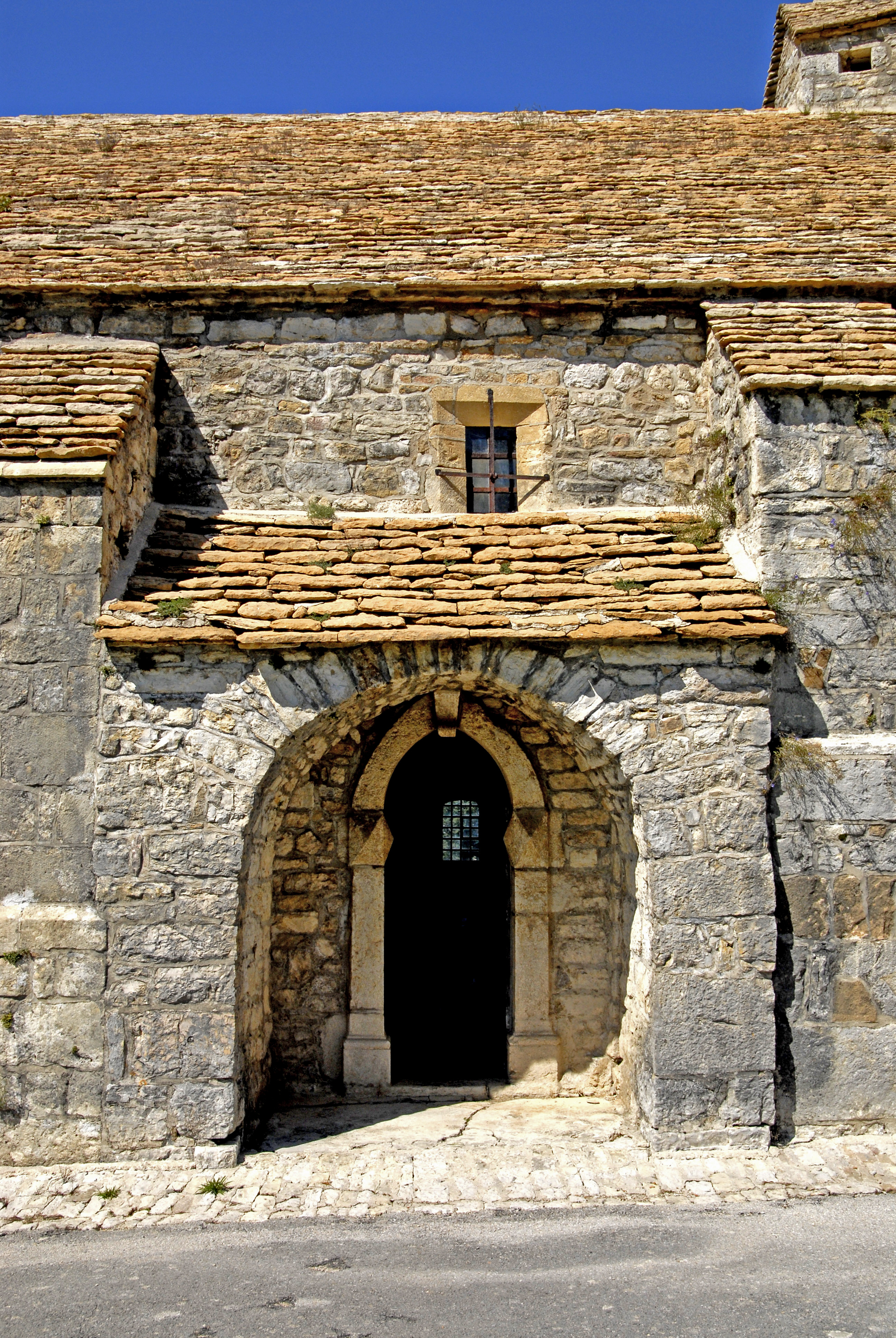 Saint-Hymetière, Südportal im Narthex